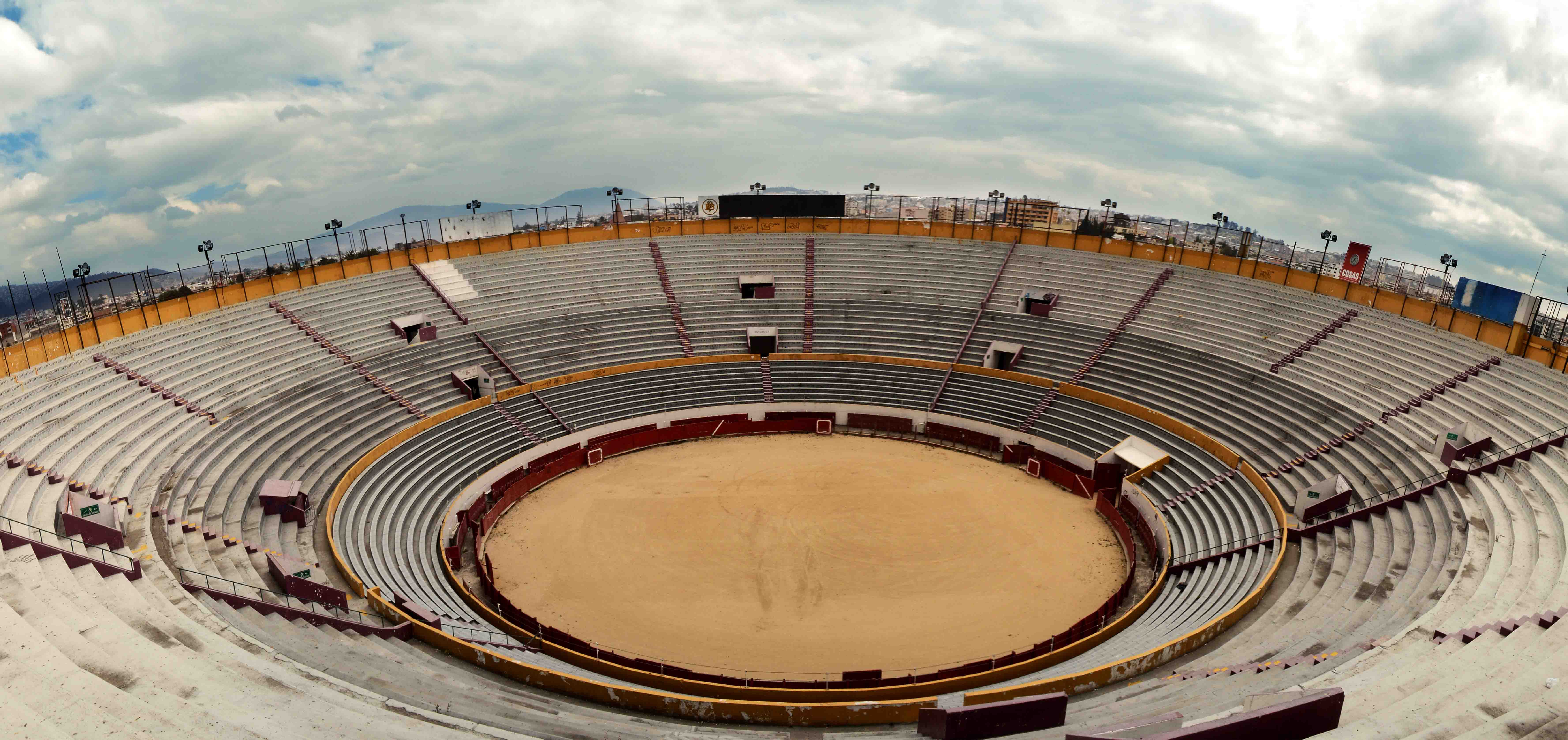 Plaza de toros Quito 2014. Fotografías: Carlos Rodríguez L.